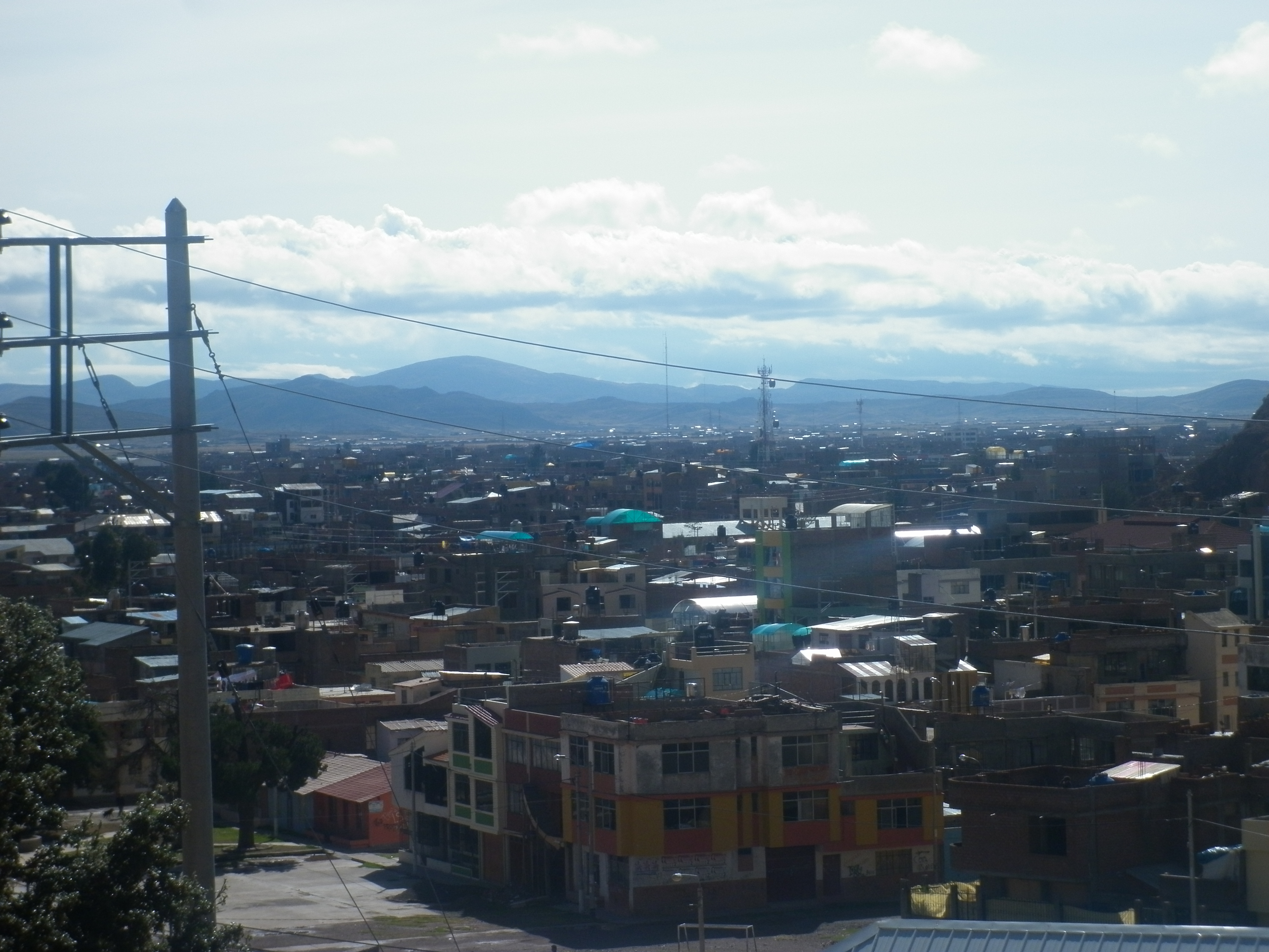 imagen panorámica de la zona sur-este Runa Simi: uj allin rijchapi Hullaqallactapi